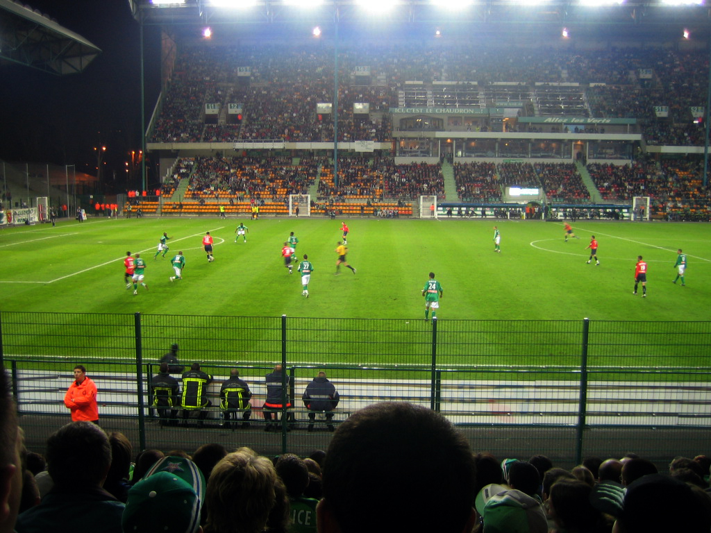 ASSE-Lille Coupe de la Ligue, 26 octobre 2005